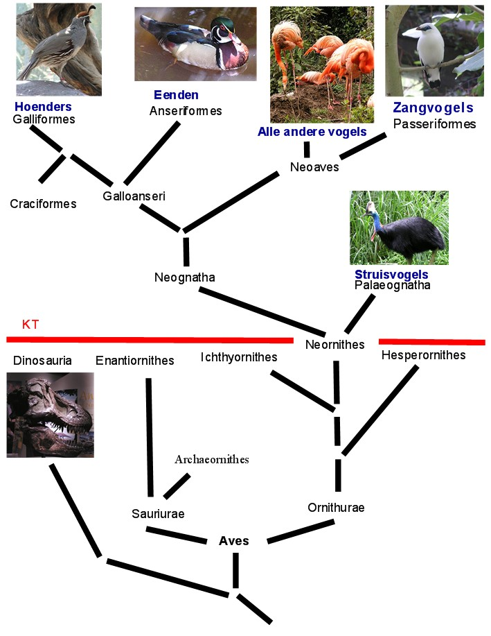 nieuwe vogelstamboom eigen tekening